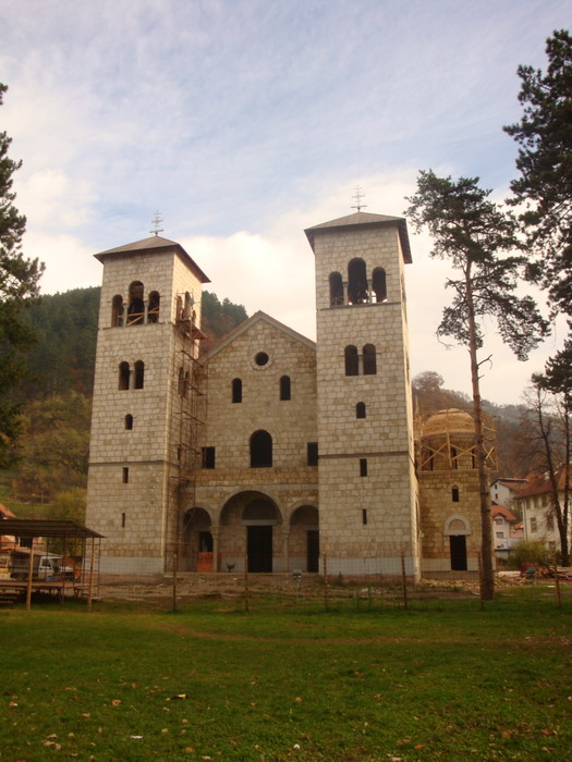 Храм_Светог_Саве_у_Фочи